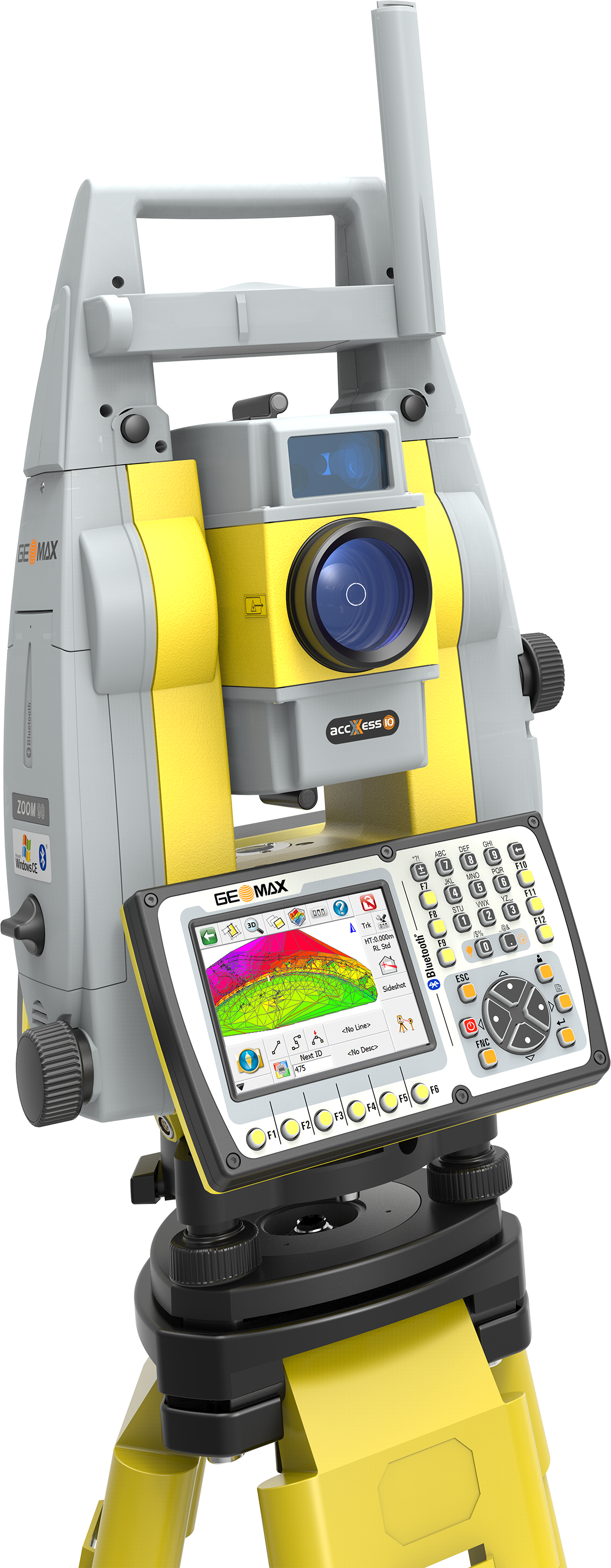 Station totale robotisée GeoMax zomm90